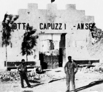 Ridotta Capuzzo